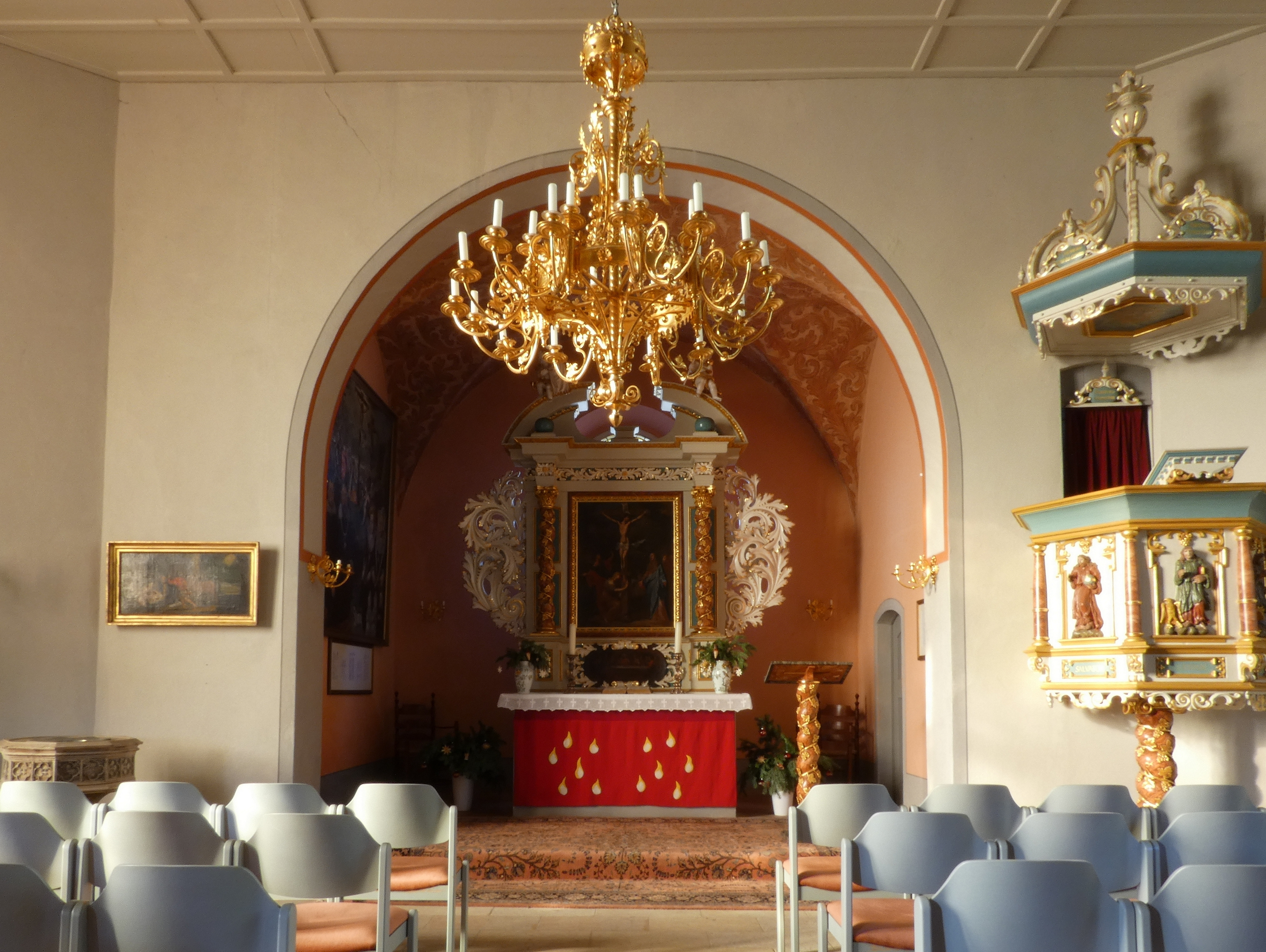 Dorfkirche Bagow innen